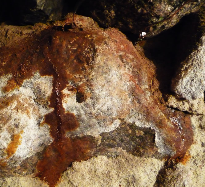 Elektroosmose: Fugt-, salte-samling som det ses omkring Anoden efter en uge. Omkring Anoderne samles vand, salt (Elektromigration)